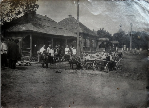 Беларуская (тарашкевіца): Хаславічы (Chasłavičy)